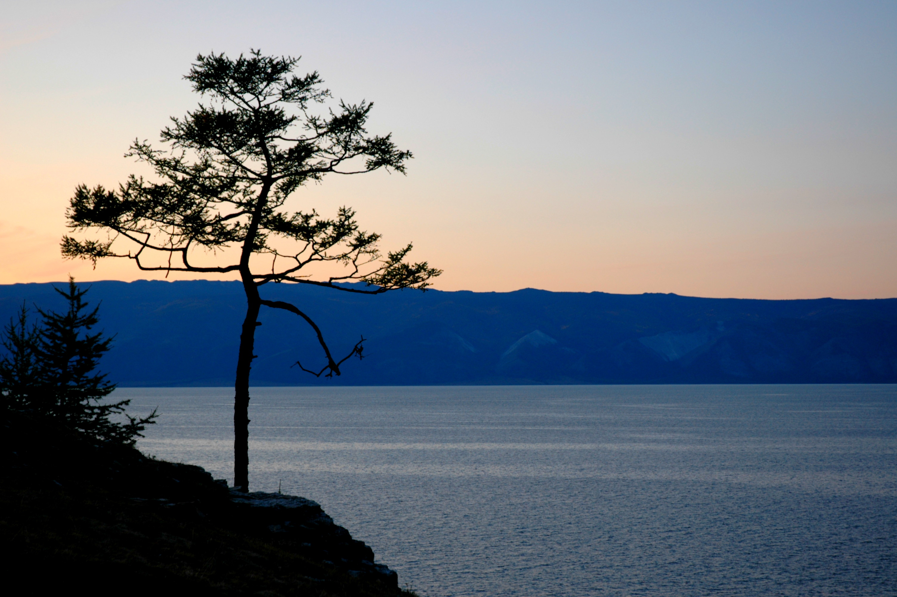 Olhon Island (Lake Baykal)